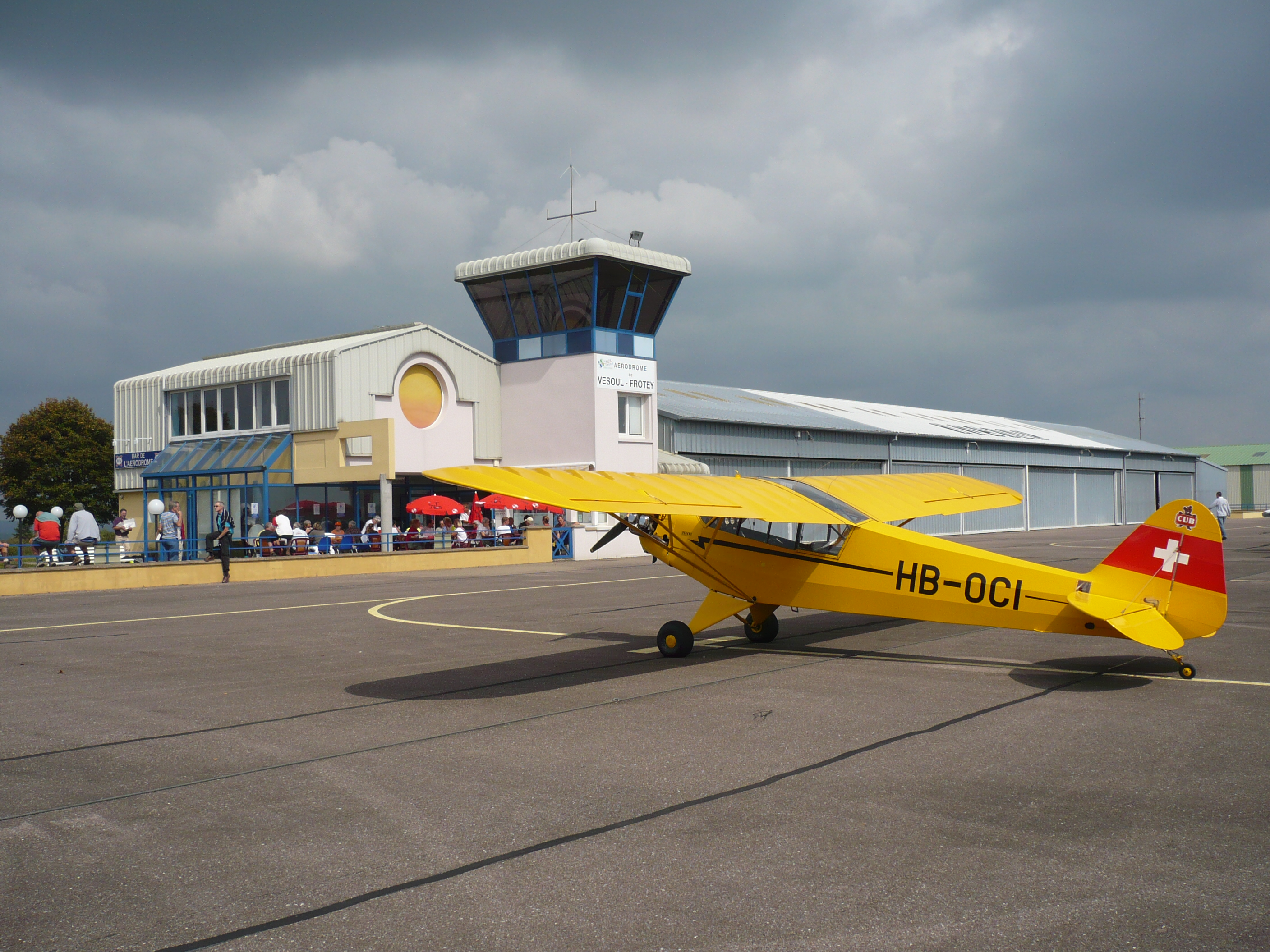 HB-OCI Piper L4 1944